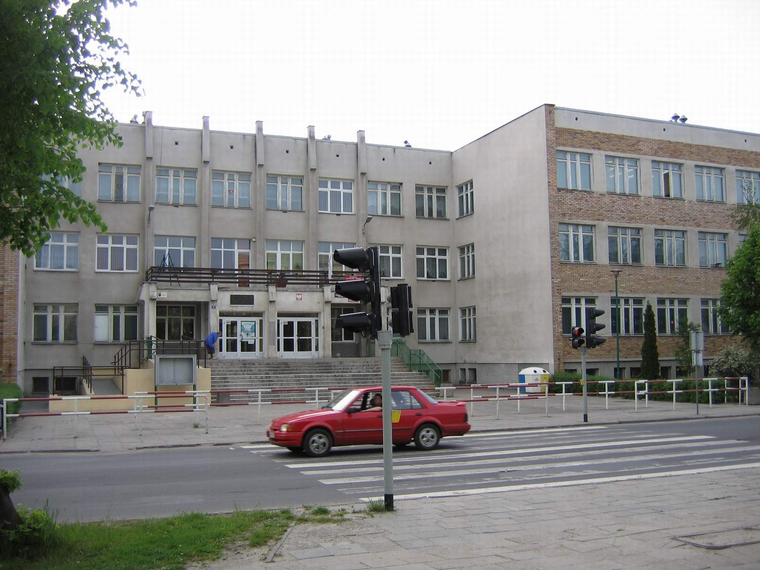 Szkoła Podstawowa nr 3 im.A Mickiewicza, ul. Kopernika, Słupca. (foto. Marcin Majdecki)